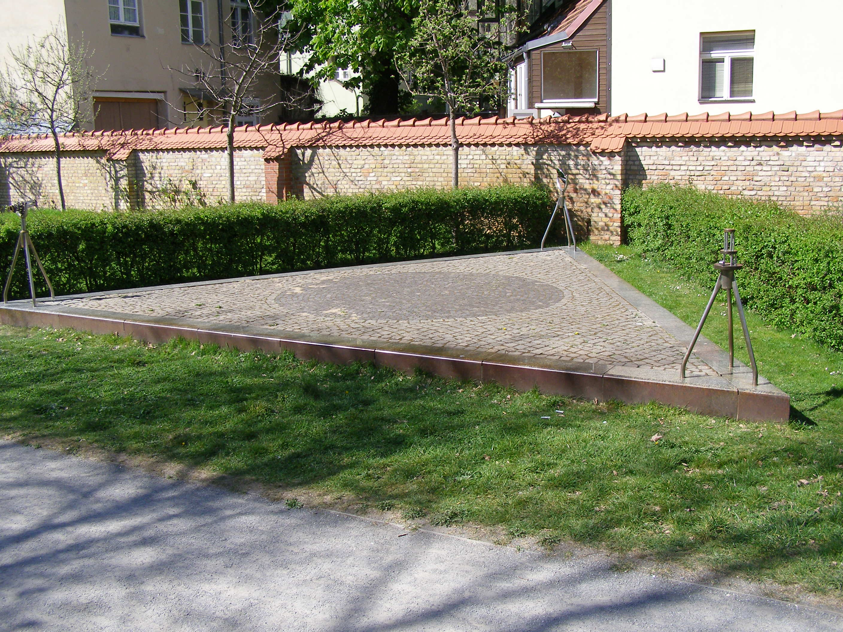 Böhmisch Rixdorf (Berlin): das Auge Gottes im Comenius-Garten